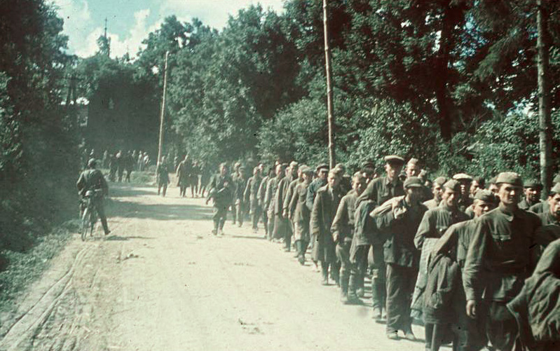 Russische Kriegsgefangene aus den Kesselschlachten bei Charkow und am Don Sommer 1941 Information added by Wikimedia users.: Или это не лето 1941, или не район Харькова-Дона. В районе Харькова в июне 1942 были массы пленных (Барвенковский котёл).